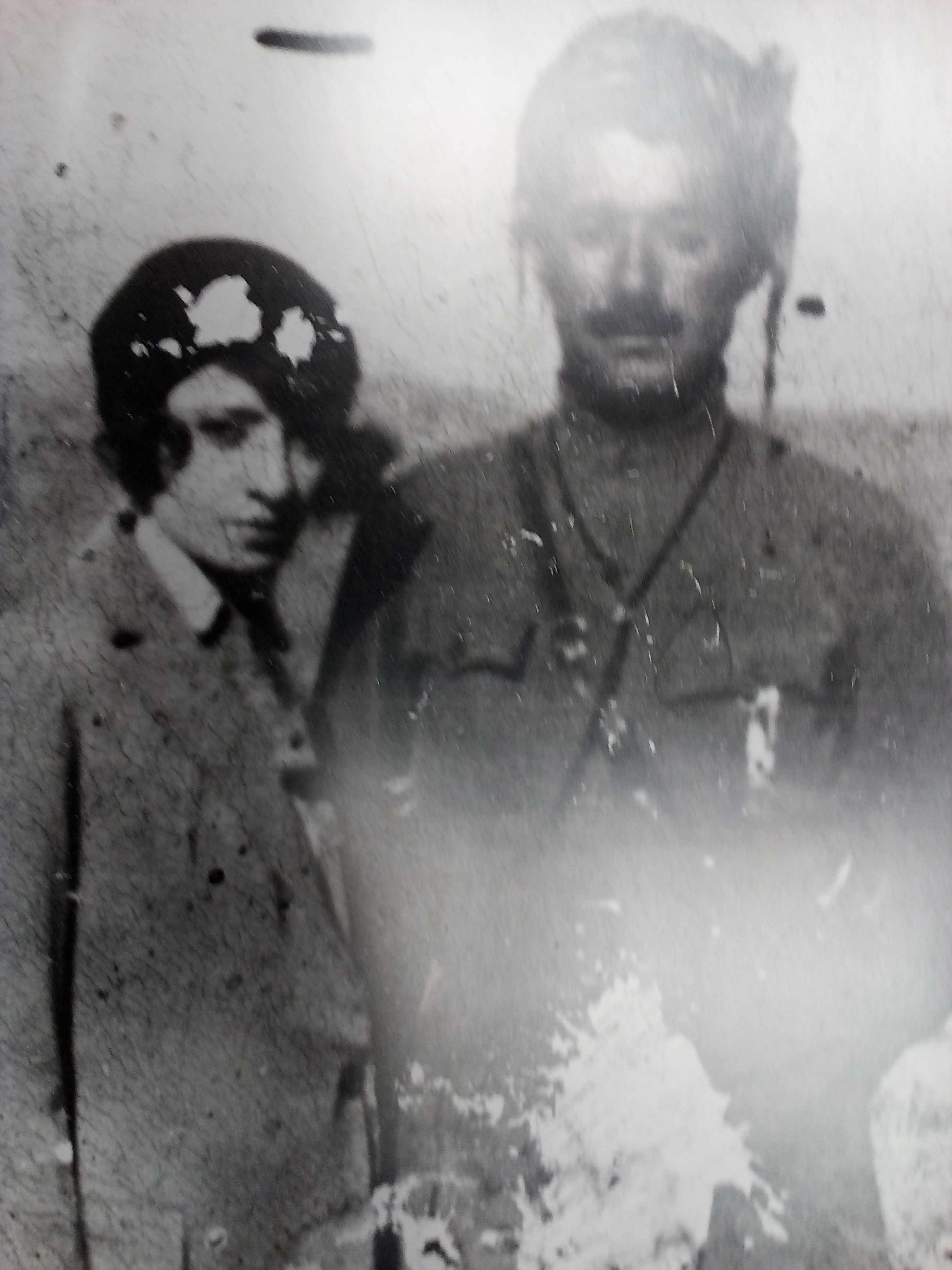 Ihsan Nuri posa para una foto junto a su mujer.